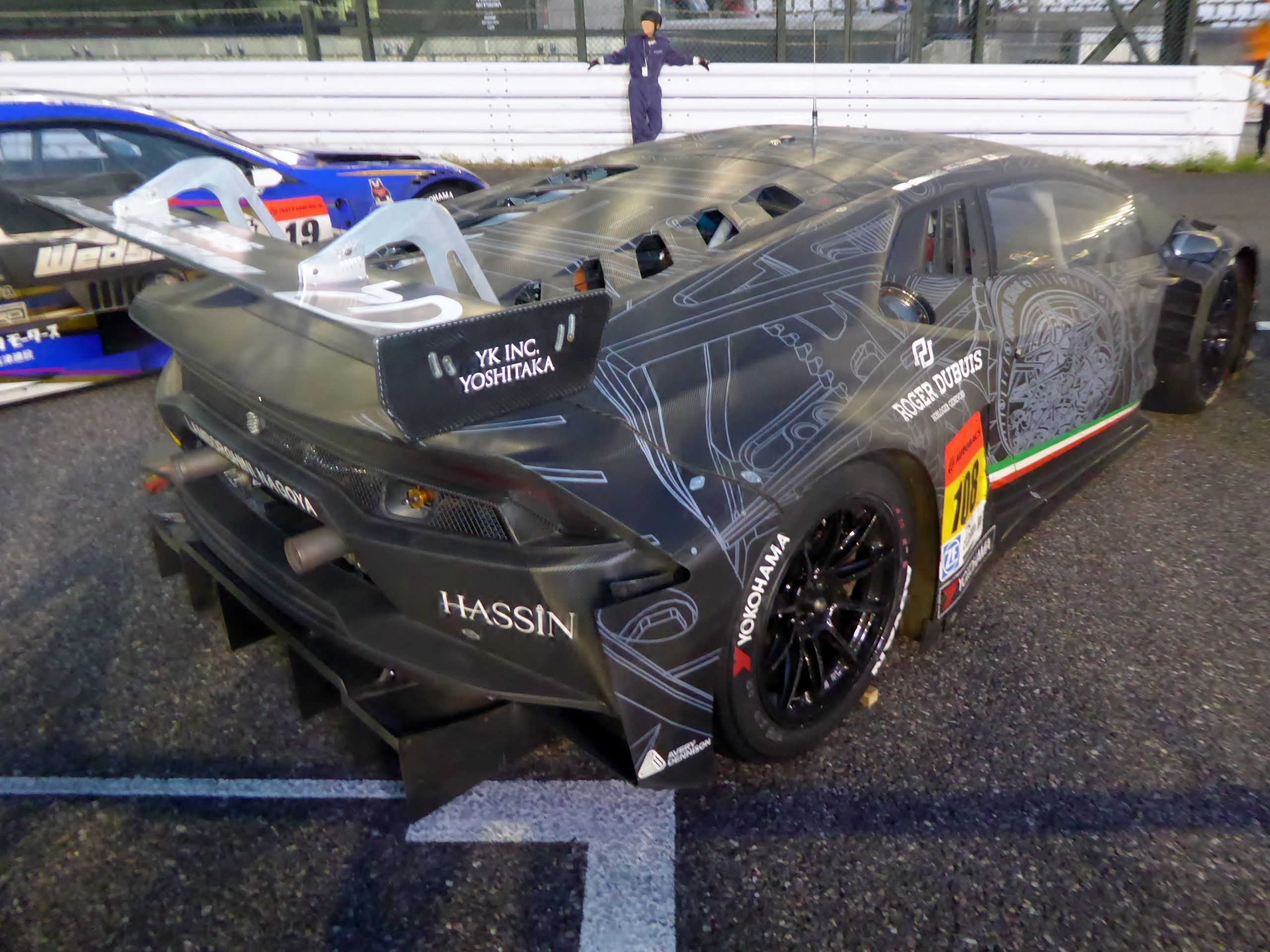 2016年鈴鹿1000㎞終了後の108号車DIRECTION 108 HURACANを撮影。